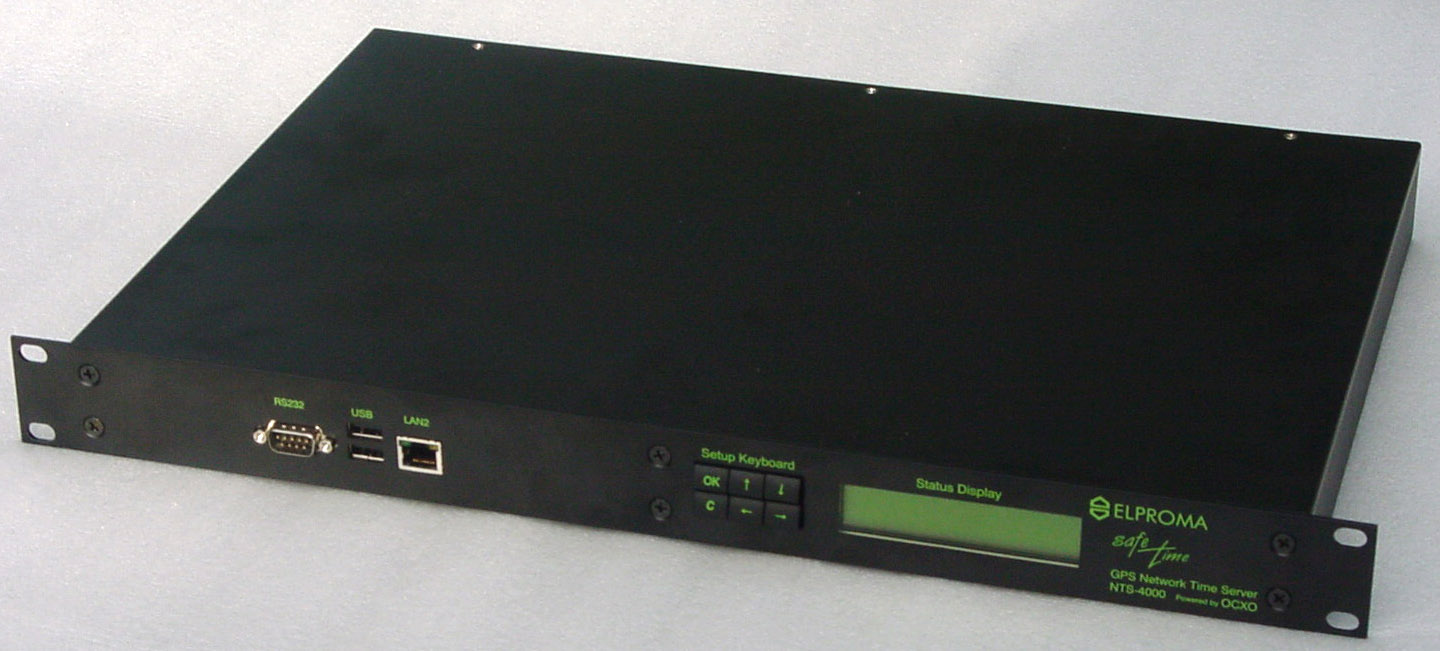 Przykładowy wygląd serwera czasu którego czas jest synchronizowany do GPS, DCF77. Serwer ma wbudowany oscylator OCXO podtrzymujący czas.